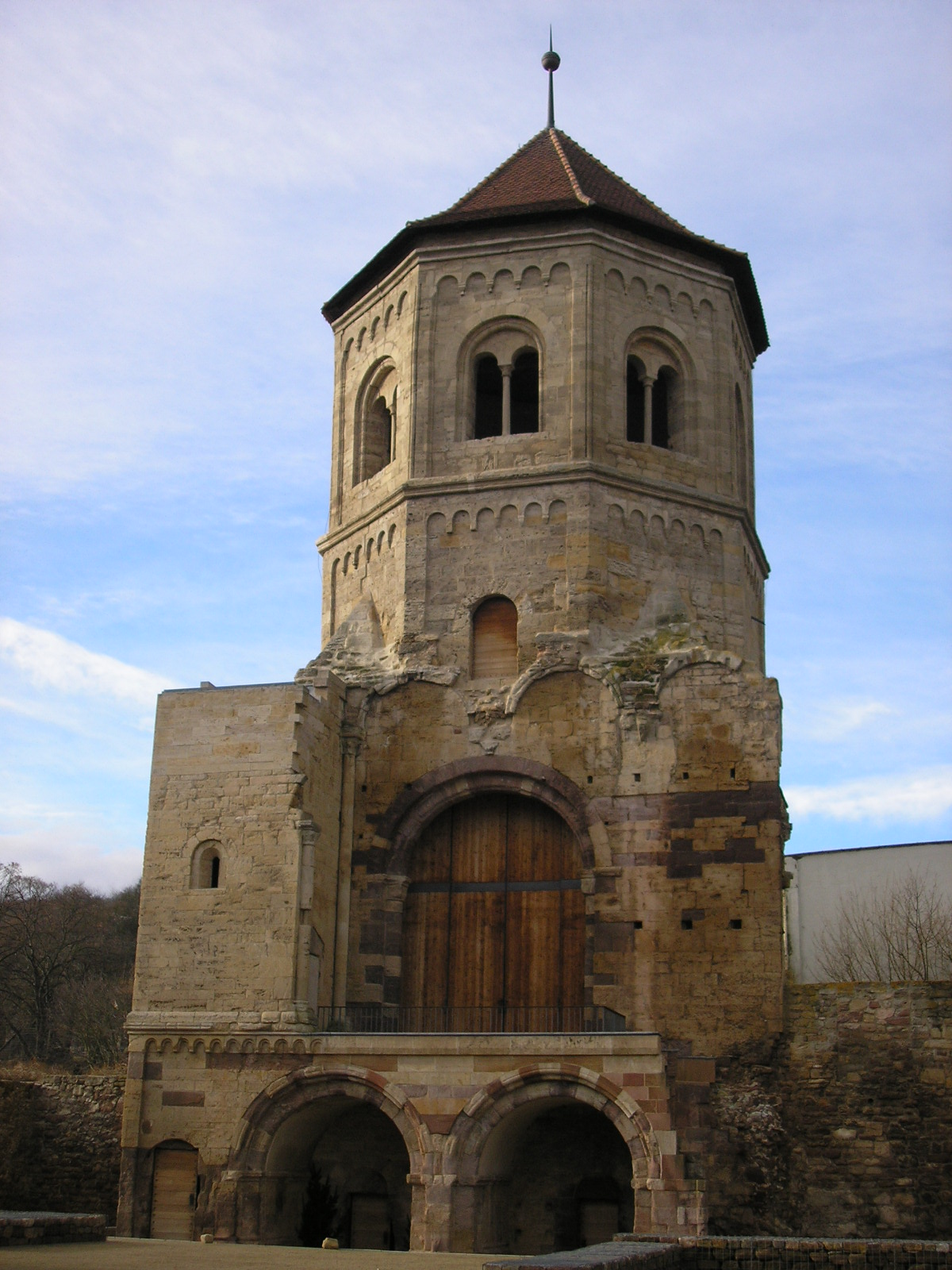 Ruine des Klosters Göllingen (Thüringen), Ostansicht.